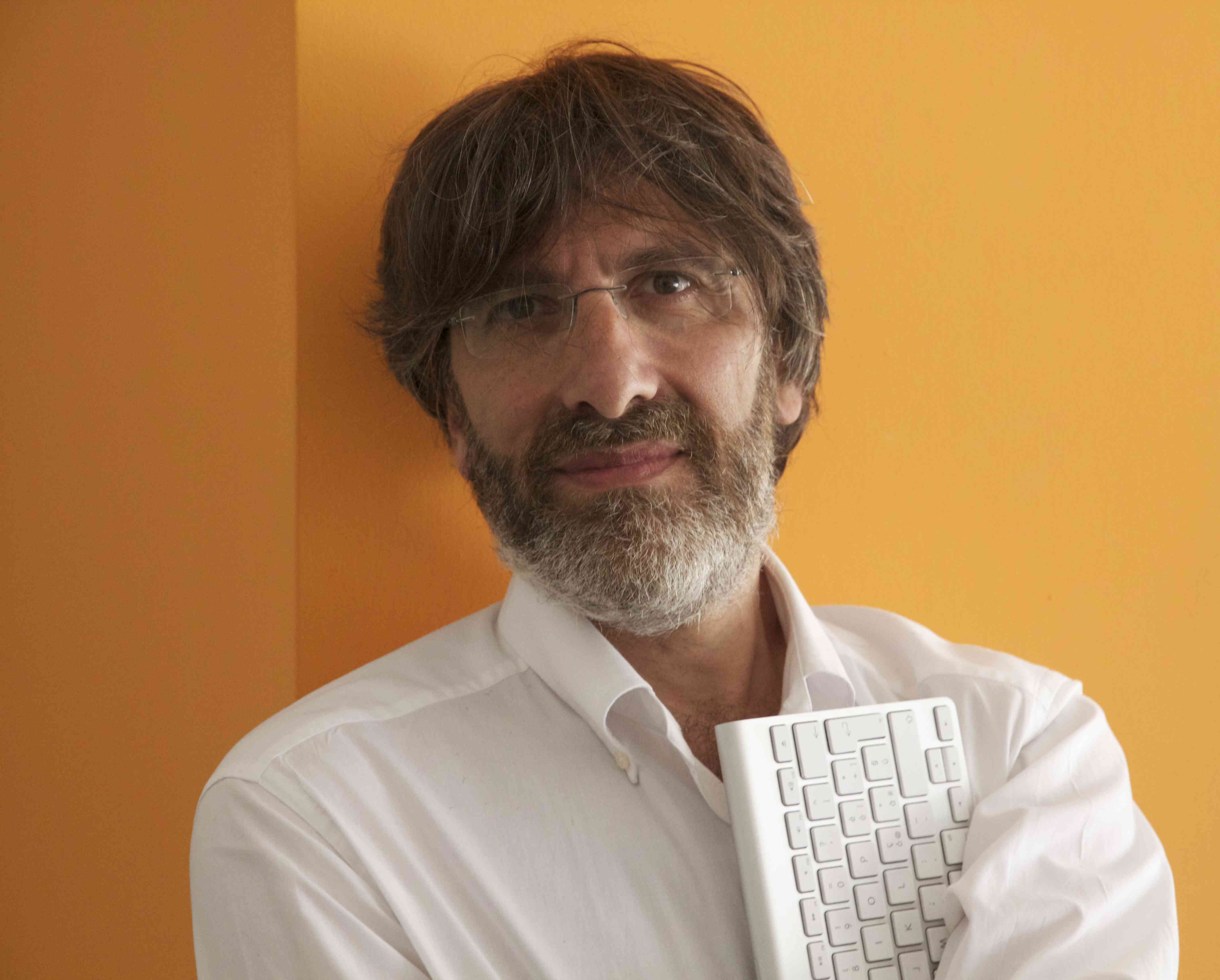 Il giornalista e scrittore Roberto Cotroneo